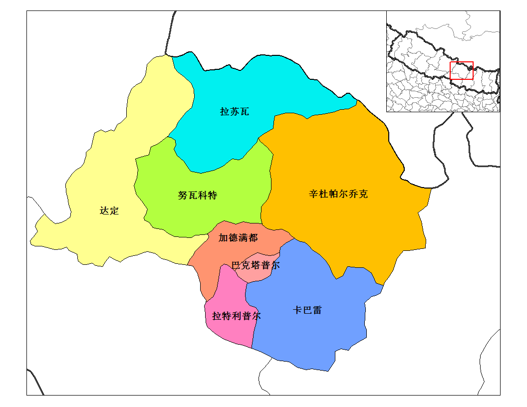 尼泊爾巴格馬蒂專區，來源：自製。—Shibo77 2007年7月26日 (四) 23:14 (UTC)